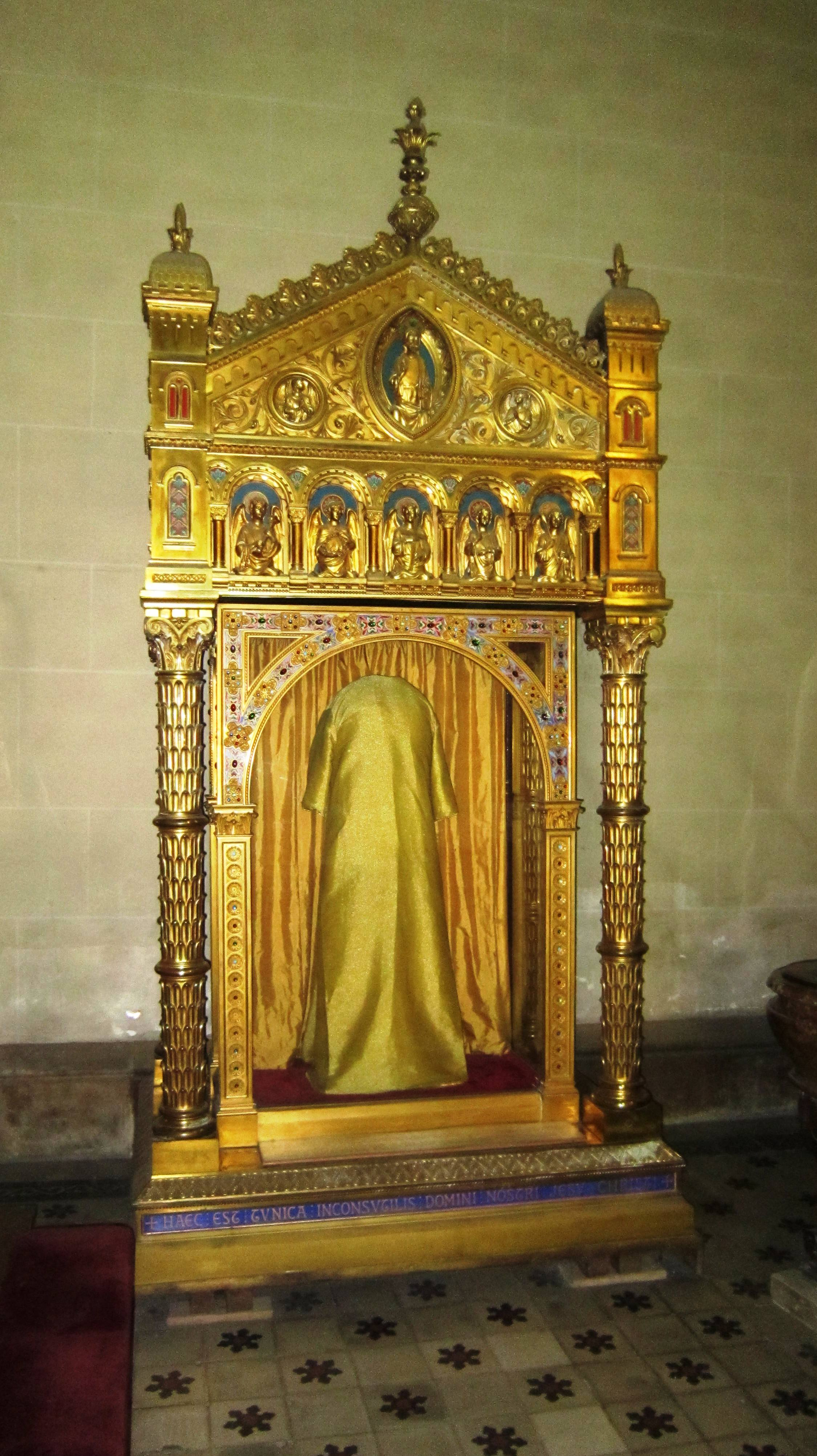 Basilique d'Argenteuil. Châse d'exposition de la Sainte-Tunique